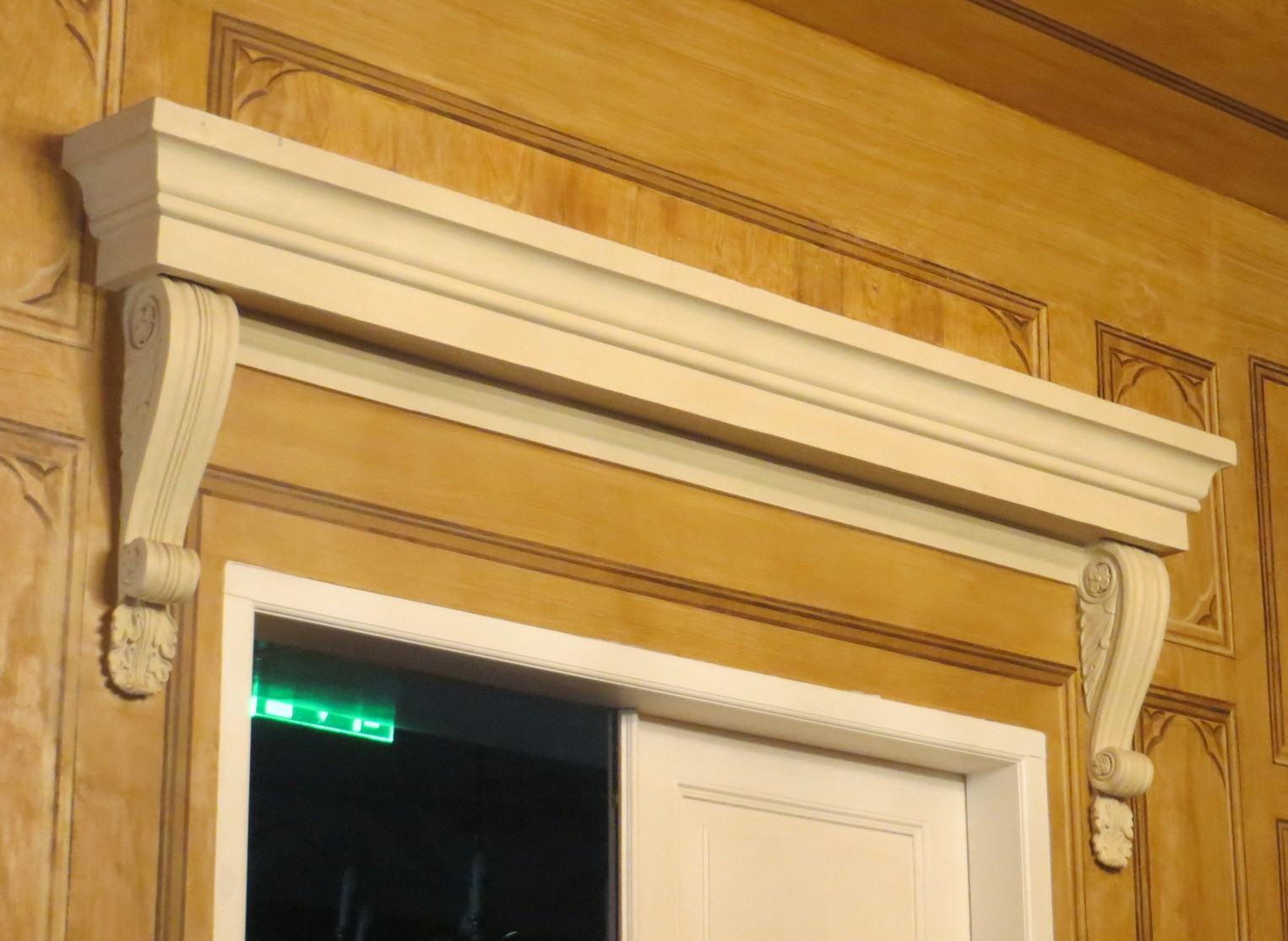 Karniis ukse kohal. Suure-Kõpu mõis Viljandimaal